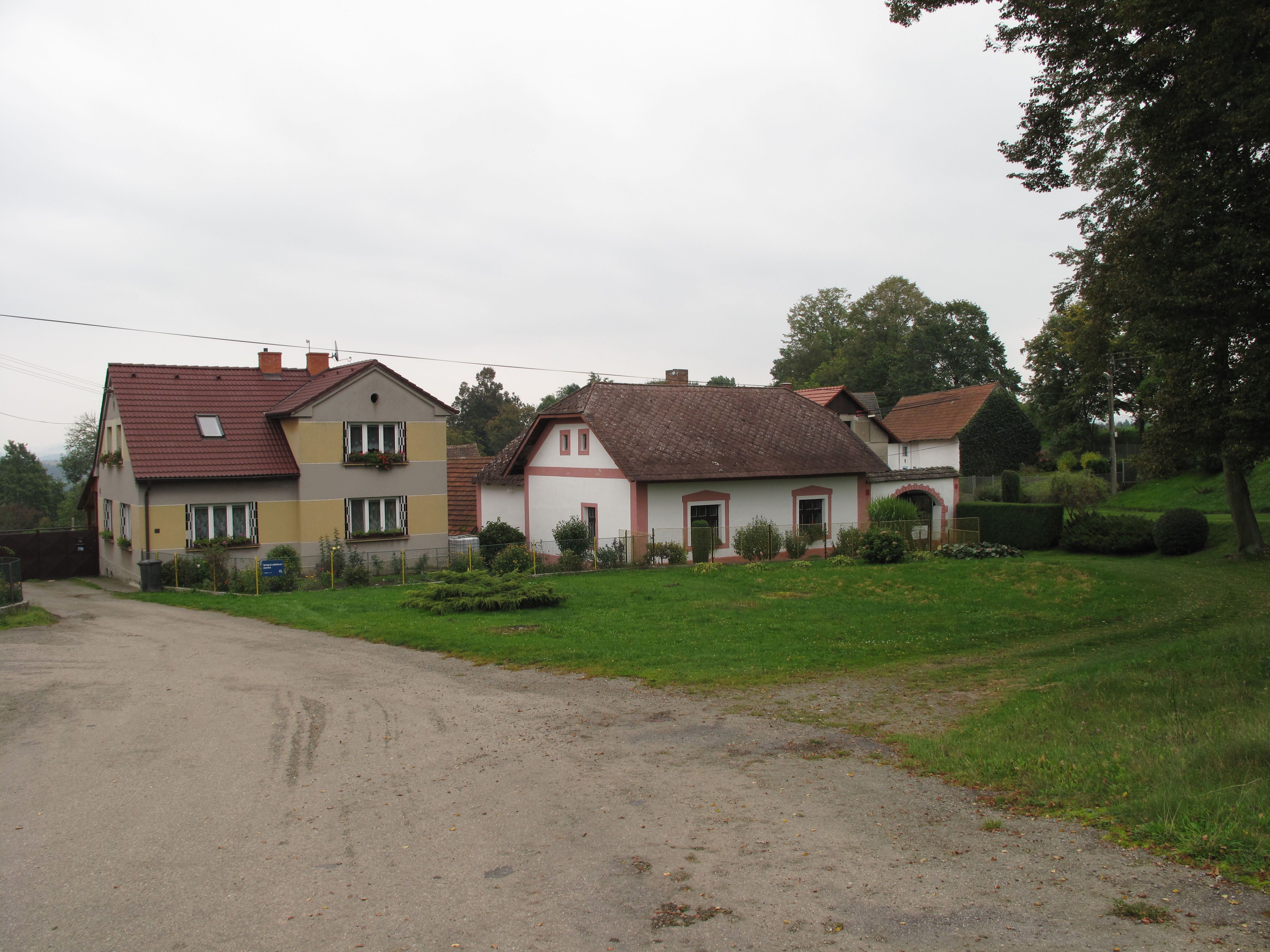 Domy v Moravči. Okres Tábor, Česká republika.